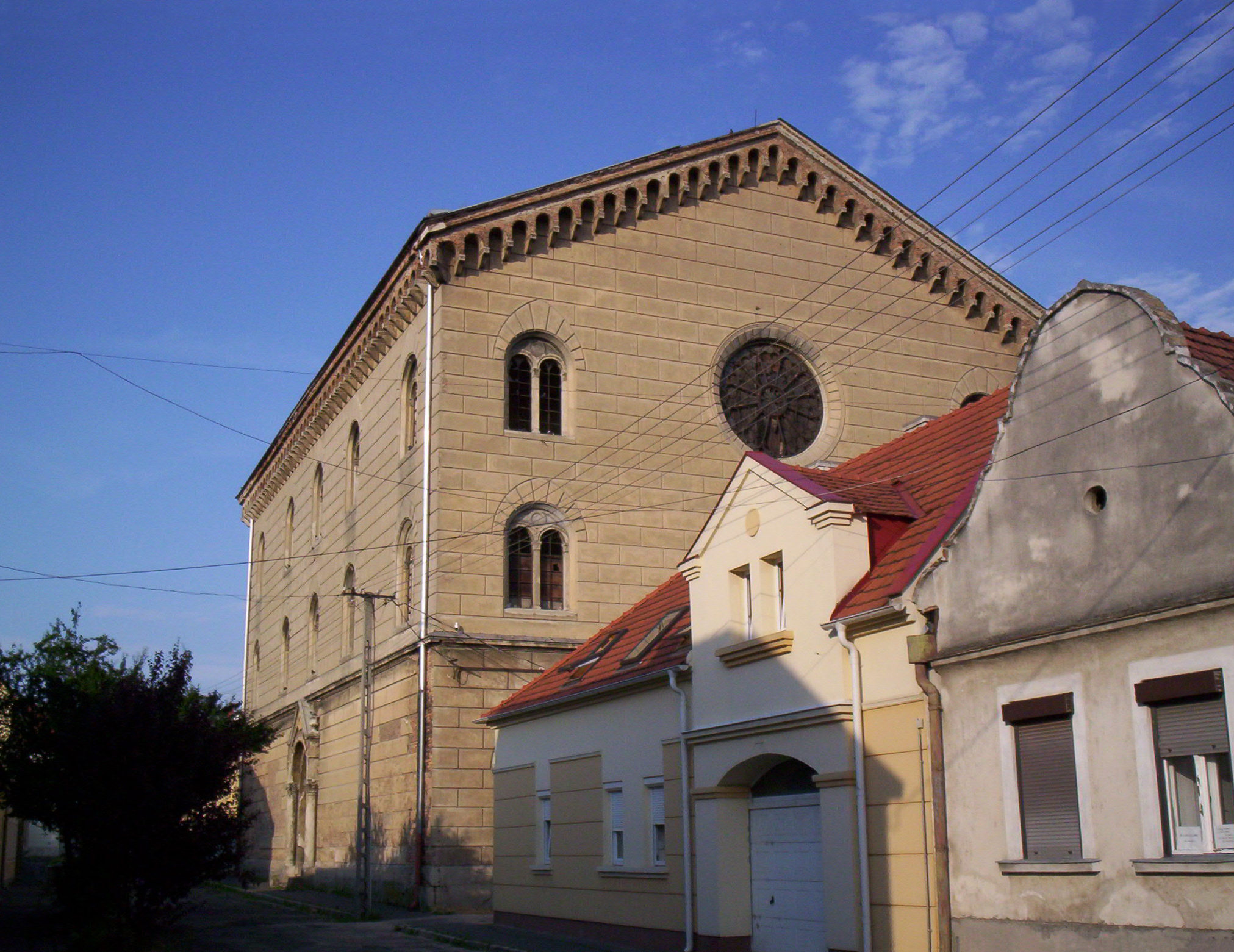 The synagogue in Pápa A pápai zsinagóga